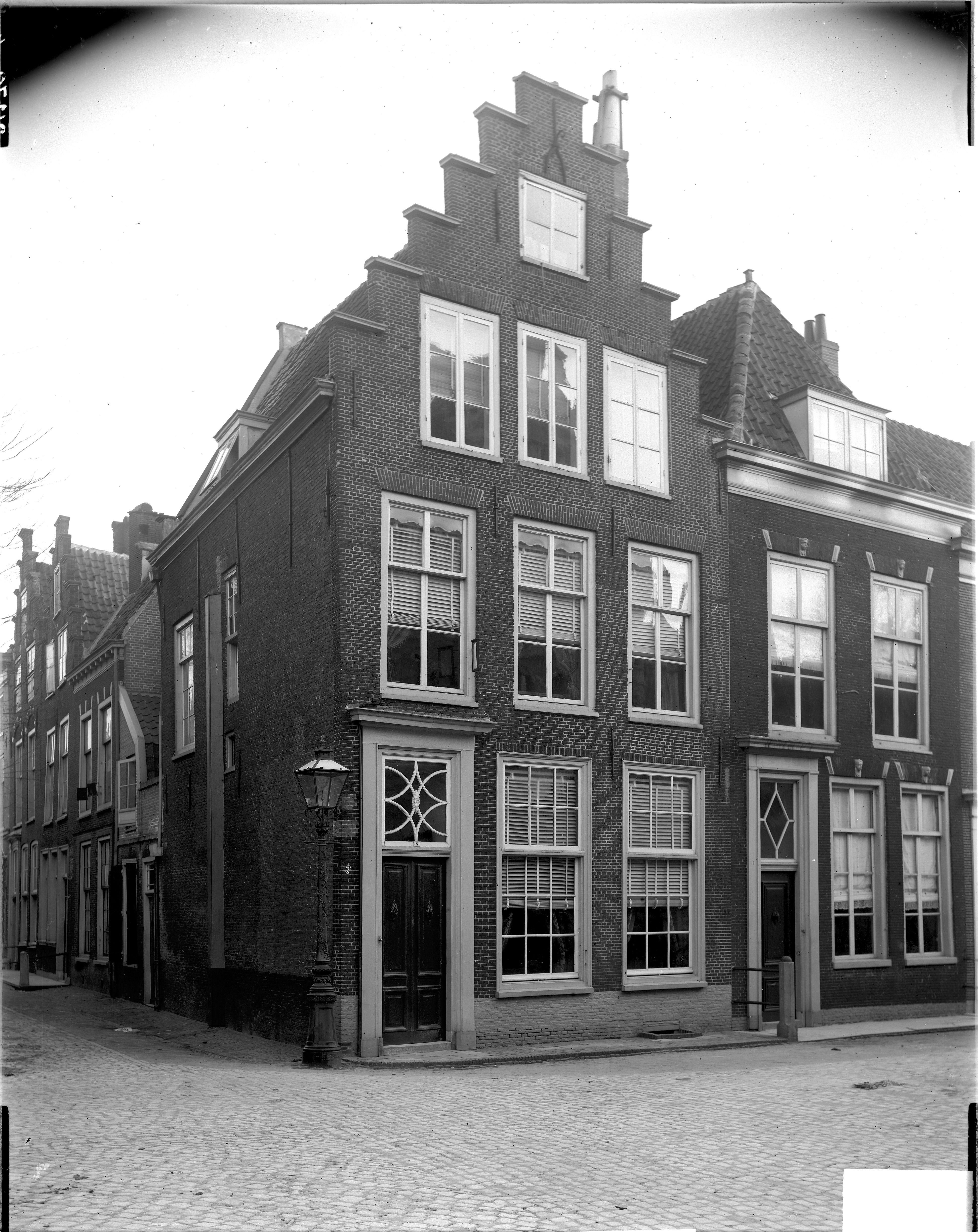 Papengracht nrs 8 en 10 in Leiden, op de hoek met de Langebrug. Op nr 8 het huis van Worm.